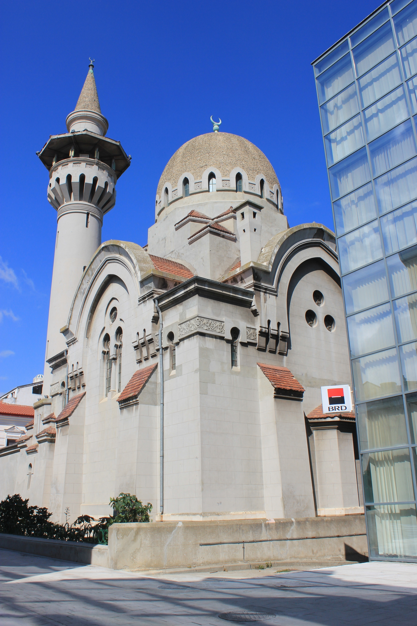 Die Carol-I.-Moschee in Constanța, Rumänien.